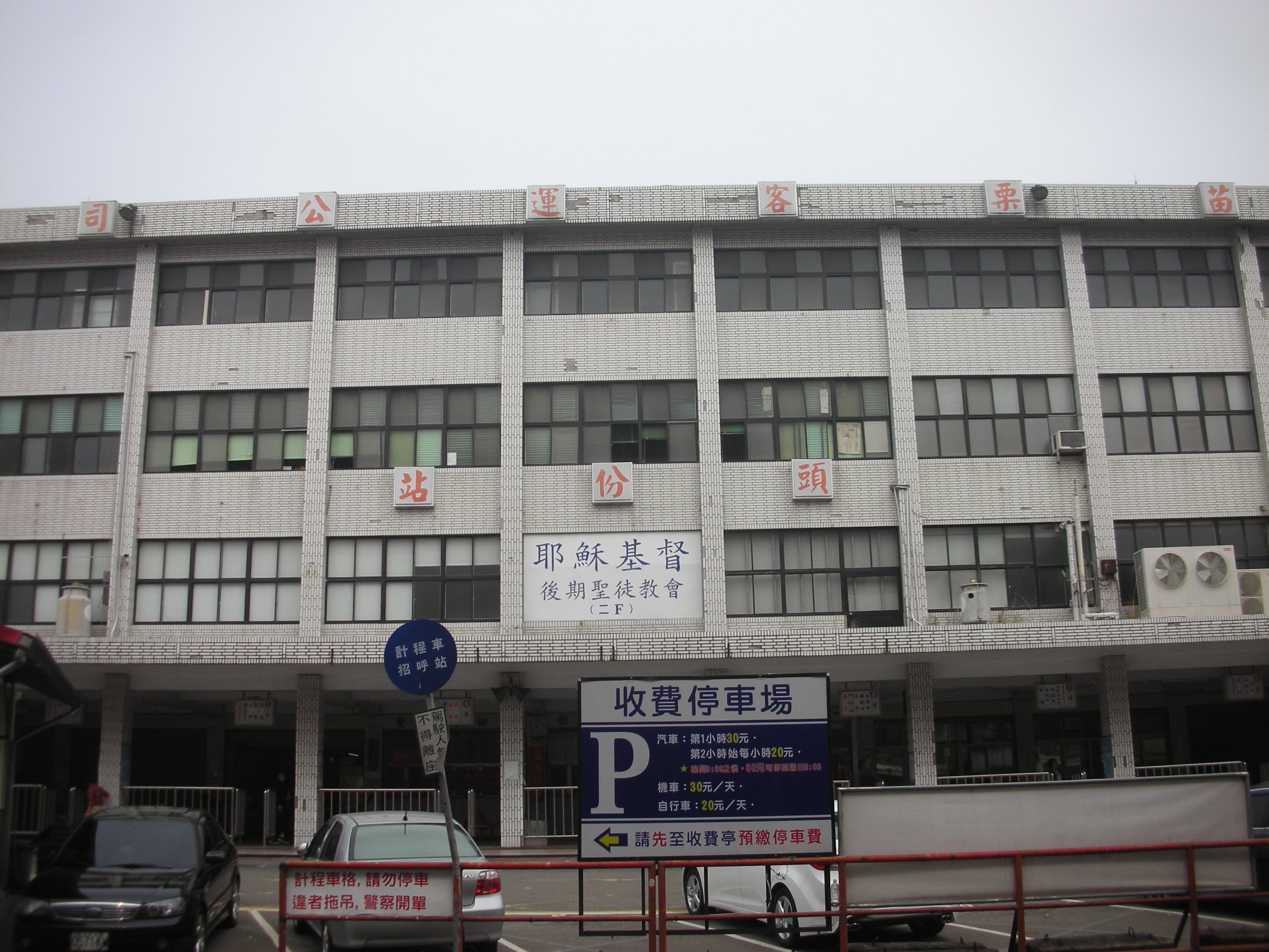 中文（台灣）: 苗栗客運頭份站，與國光客運頭份站共站。下方為收費停車場。